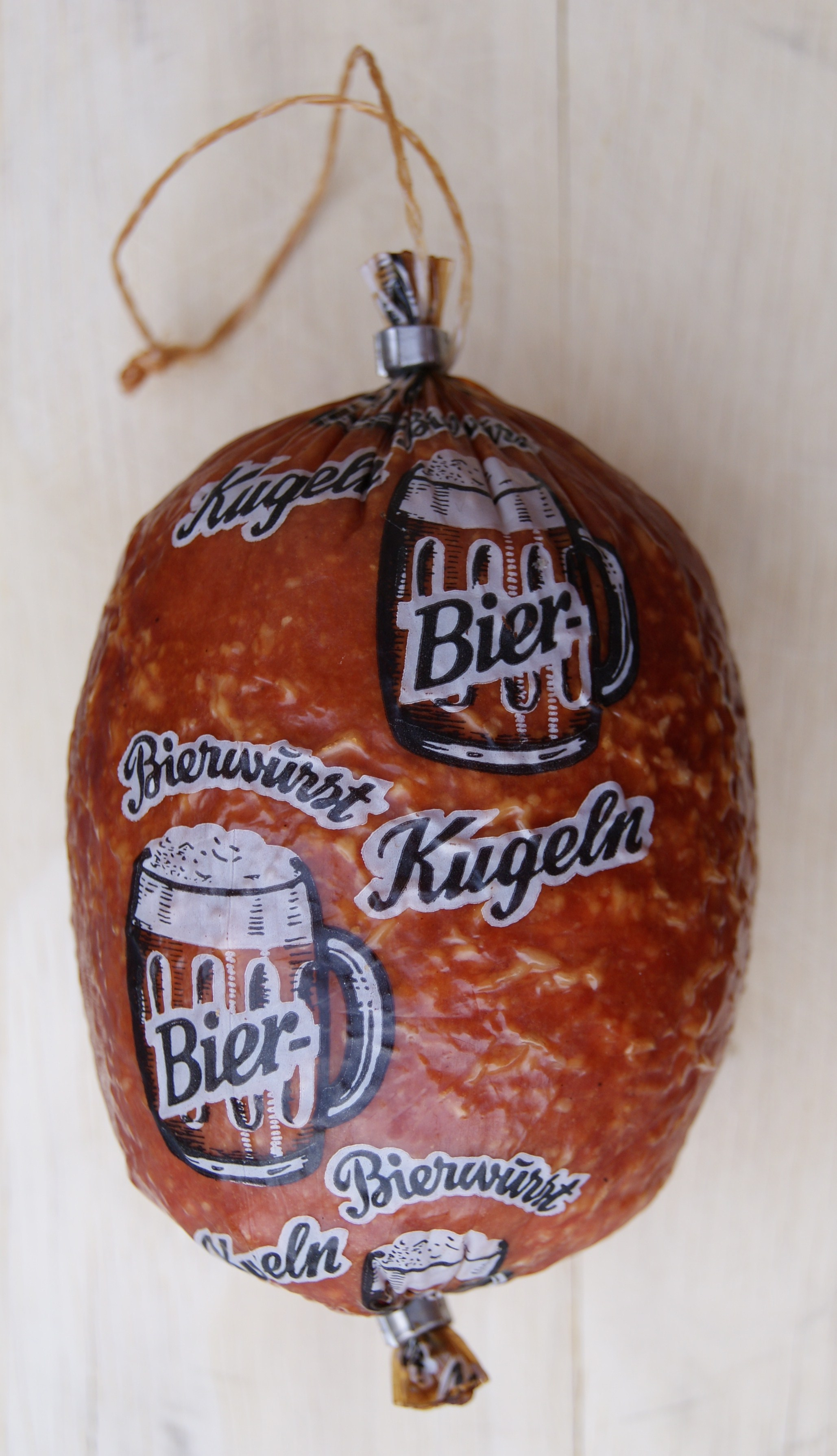 Bierkugel 360 Gramm